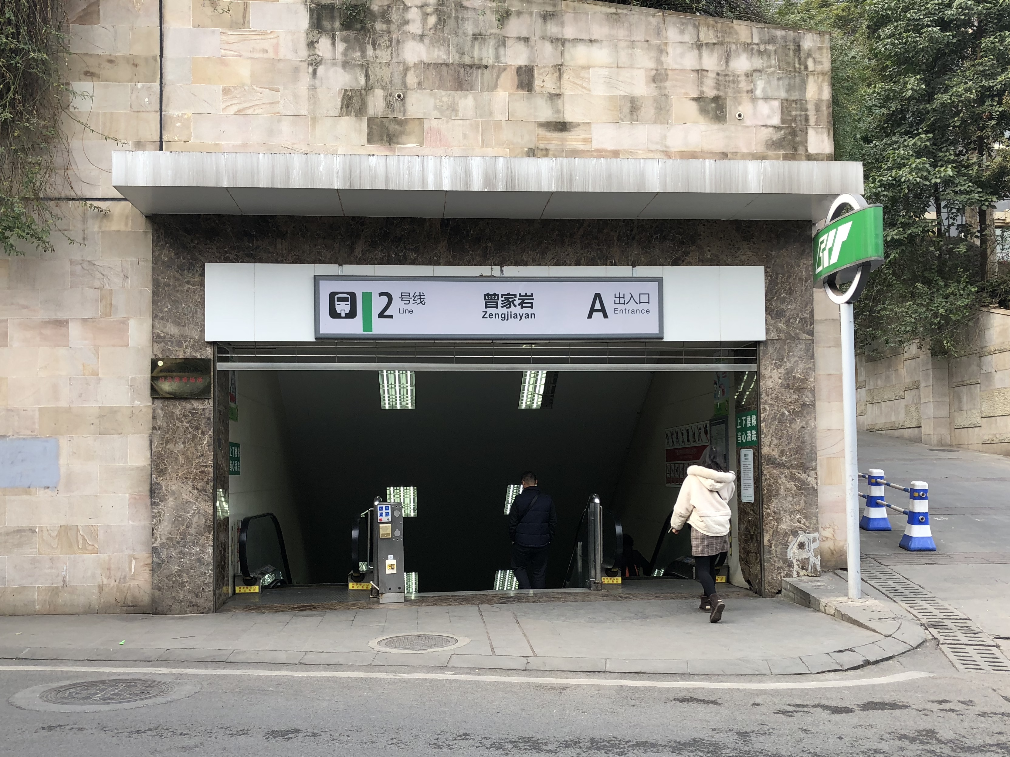 中文（中国大陆）: 2号线曾家岩站A出口